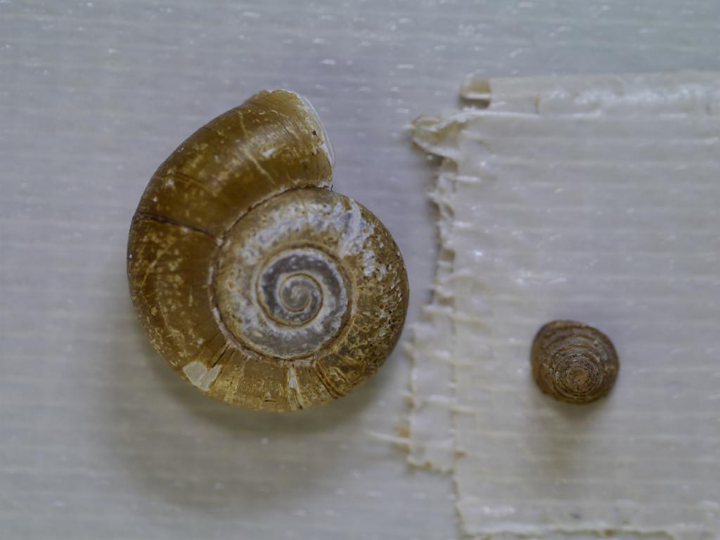 Spirostoma japonicum：ヤマクルマガイ 2017.03.12 和歌山県田辺市：Tanabe City. Wakayama Pref. Japan